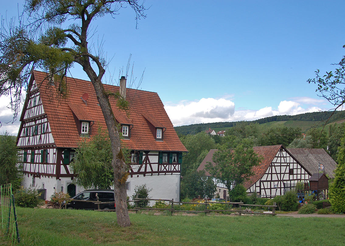 Bromberger Mühle von Südosten. Hauptgebäude mit Baudatum am Türsturz: 1610.